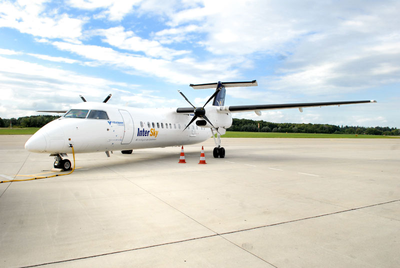 InterSky Dash8-300Q on the ramp at Friedrichshafen Airport FDH